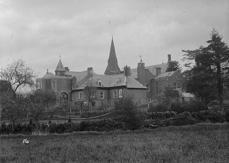 Ffotograffydd/Photographer: P B Abery (1877?-1948) Dyddiad/Date: [191-?] Cyfrwng/Medium: Negyddion gwydr / Glass negatives Maint/Dimensions: 119 x 163 mm. Cyfeiriad/Reference:PBA23/7 Rhif cofnod / Record no.: 4509144 Rhagor o wybodaeth am gasgliad P B Abery yn Llyfrgell Genedlaethol Cymru More information about the P B Abery Collection at the National Library of Wales